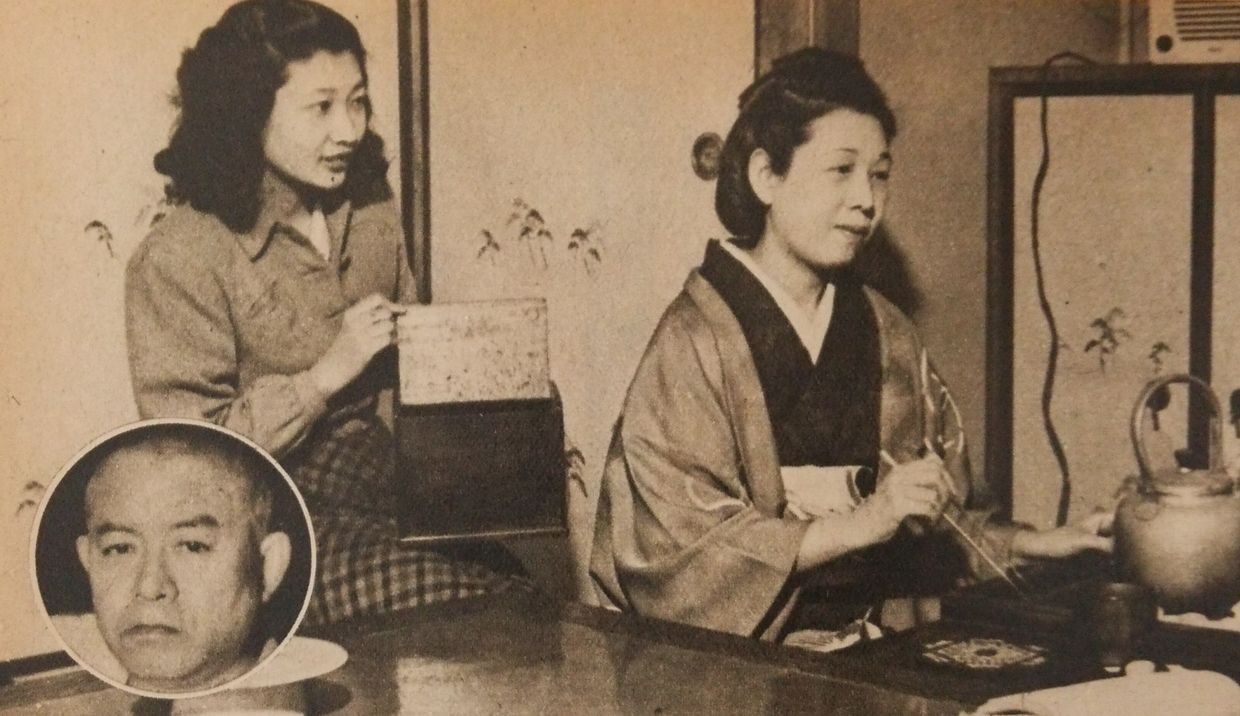 谷崎松子（右）とその娘の恵美子（左）。円内は松子の夫の潤一郎。